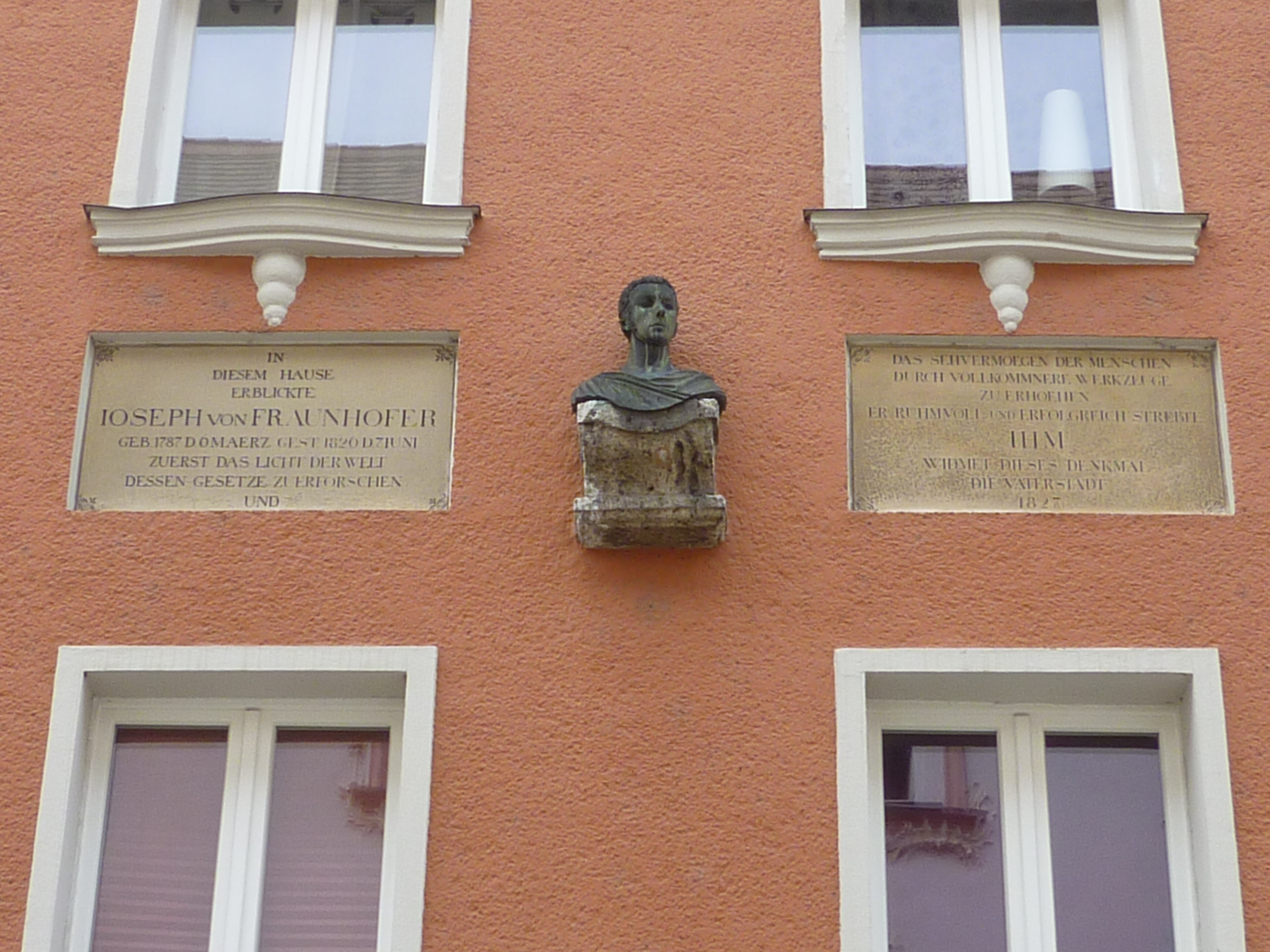 Gedenktafeln aus dem Jahr 1827 und Bronzebüste an der Fassade des Geburtshauses von Joseph von Fraunhofer in der Fraunhofer Str. 3 in Straubing.This is a photograph of an architectural monument.